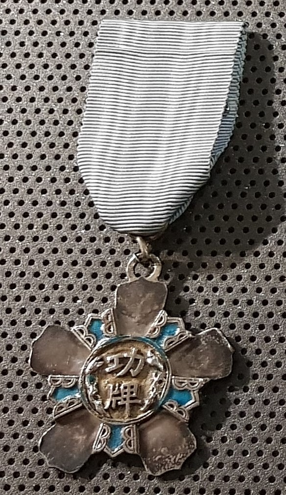 Order Smoka Podwójnego (Cesarstwo Chin)